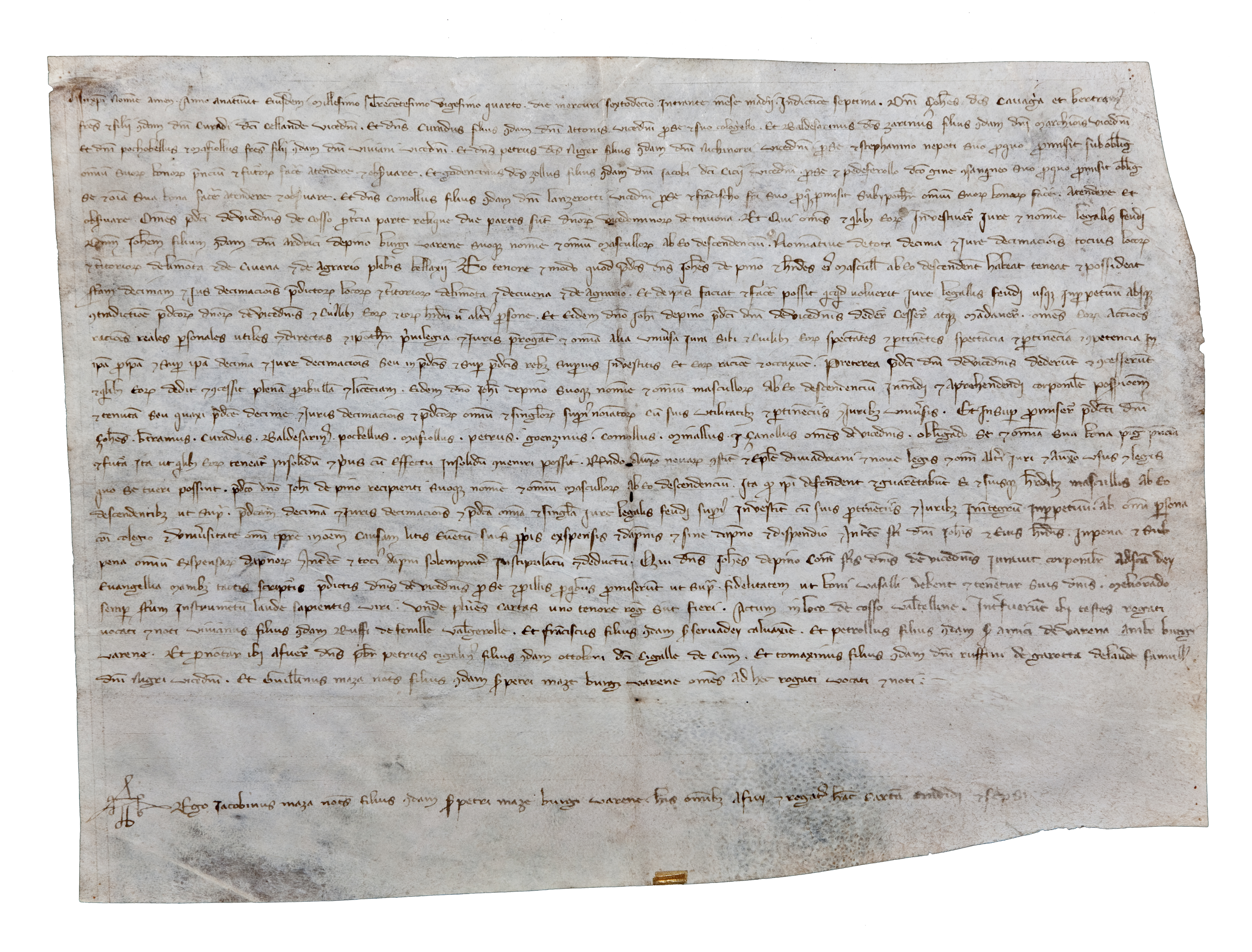 Archivio Pietro Pensa, Pergamene 4, 1